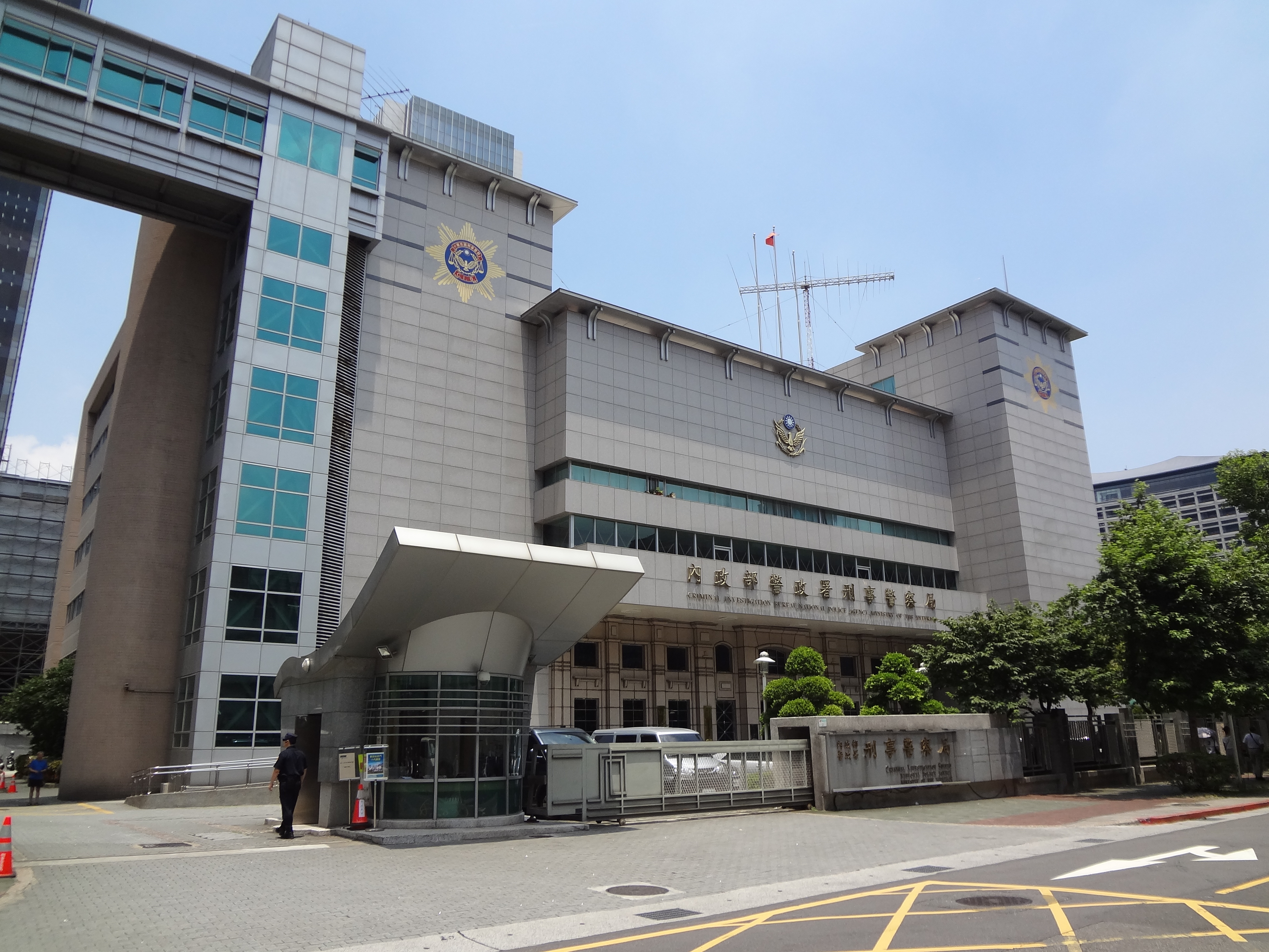 中華民國內政部警政署刑事警察局，位於臺灣臺北市信義區忠孝東路四段553巷5號。